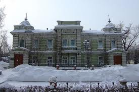 Семейный дом В А Рассушина